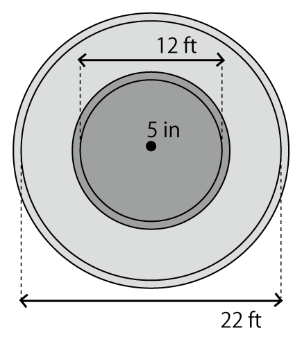 チンロンの競技用コートの図